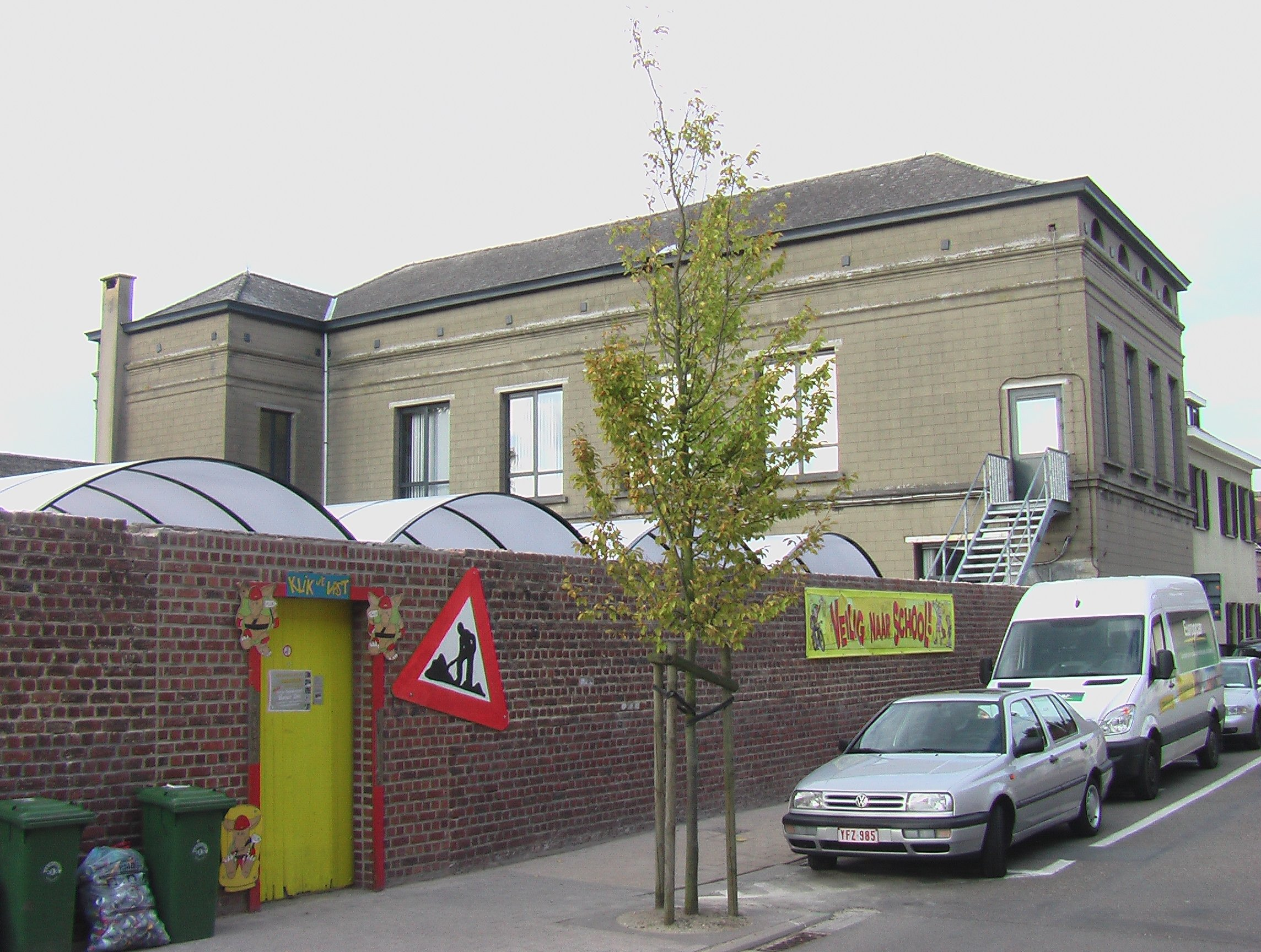 Oud gedeelte van de Vrije Basisschool Mater Dei Erps-Kwerps (gebouwd eind negentiende eeuw)